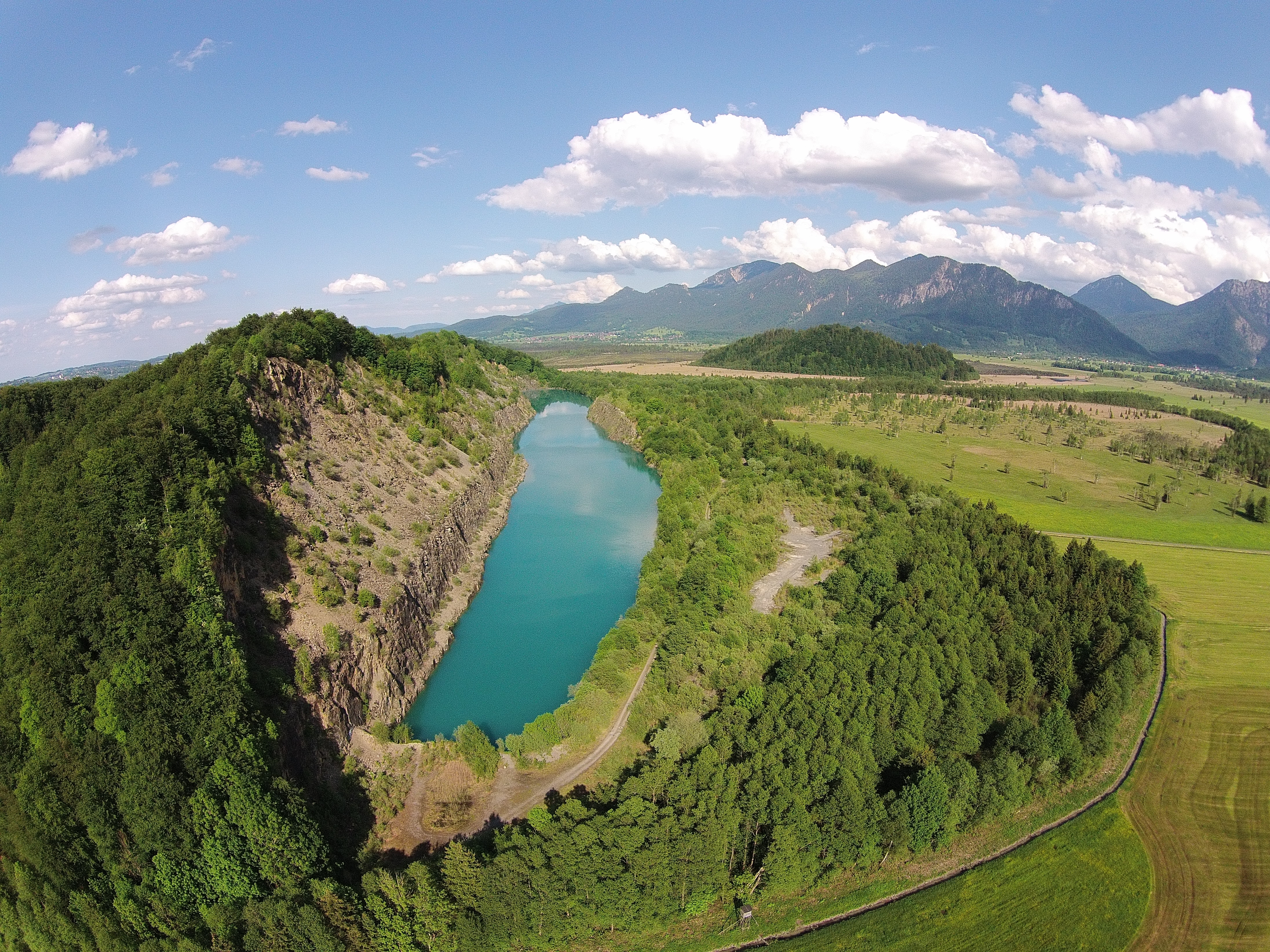 Luftaufnahme: Blick über den Berg Langer Köchel mit Steinbruchsee (ehem. Hartsteinwerk Werdenfels), FFH-Gebiet „Murnauer Moos“ in Bayern